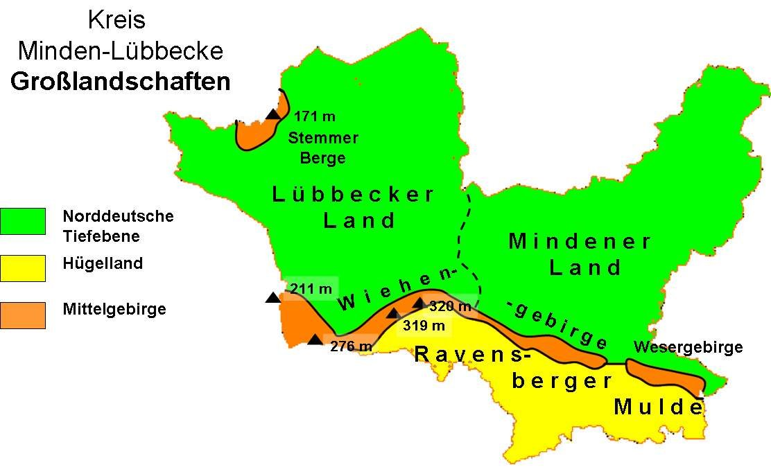 Kreis Minden-Lübbecke, Großlandschaften